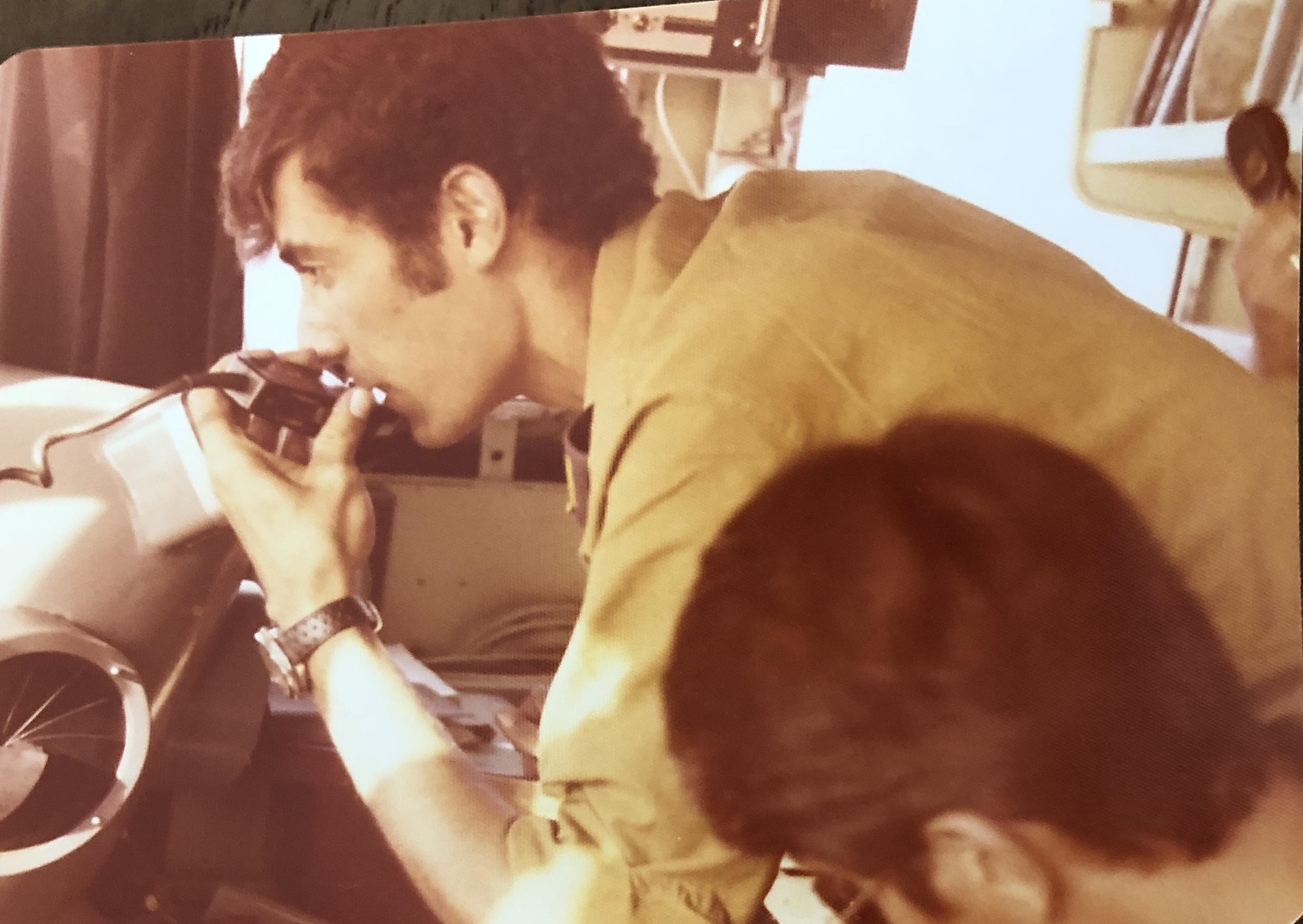 אלי רונן בגשר הסגור של אח"י רשף בתקופת מלחמת יום הכיפורים אוקטובר 1973